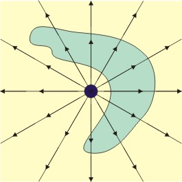 Ley de Gauss para una carga exterior